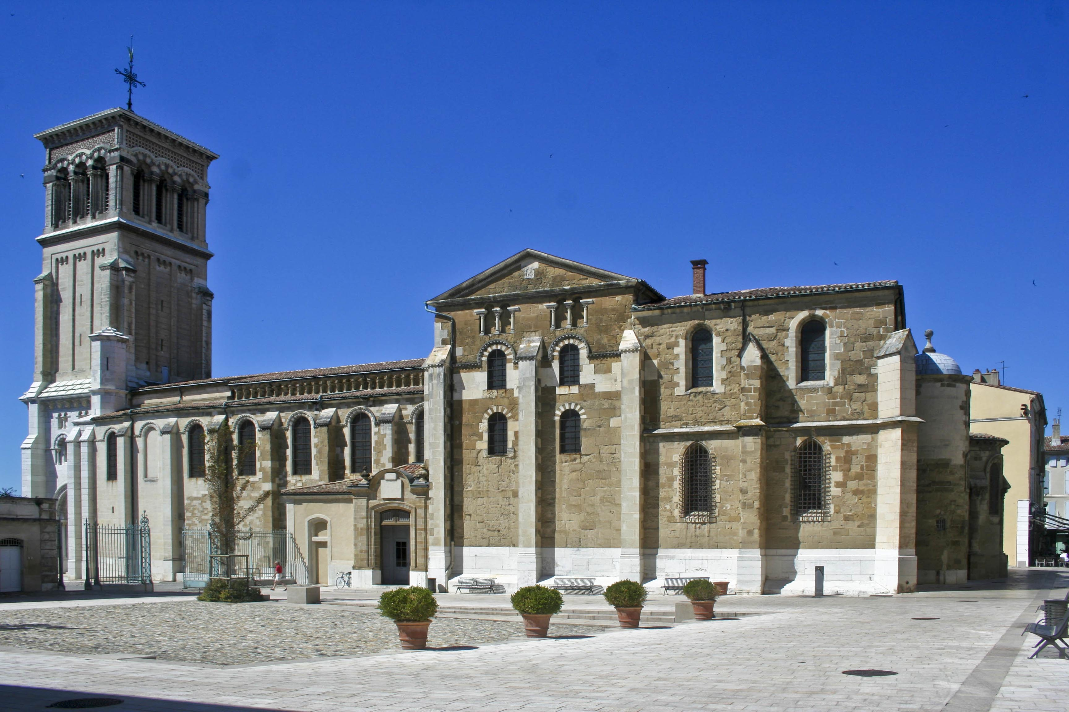 Cathédrale Saint-Apollinaire, Valence, Drôme, France